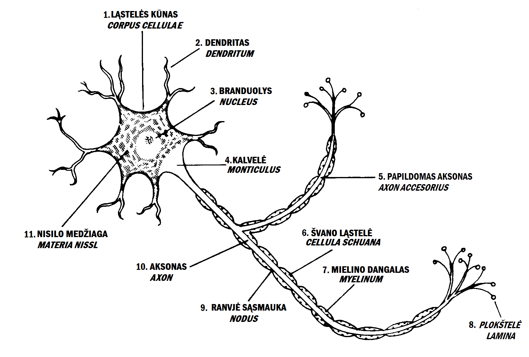 Nervinio audinio funkcinis - struktūrinis vienetas